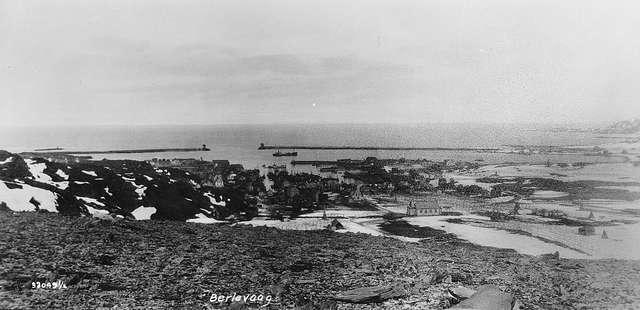 Berlevåg